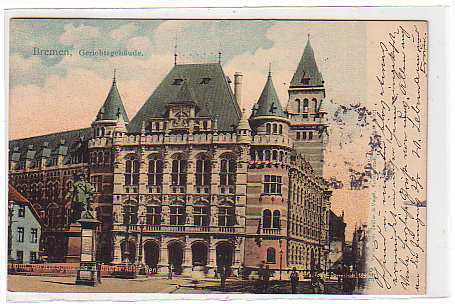 1902 Old images